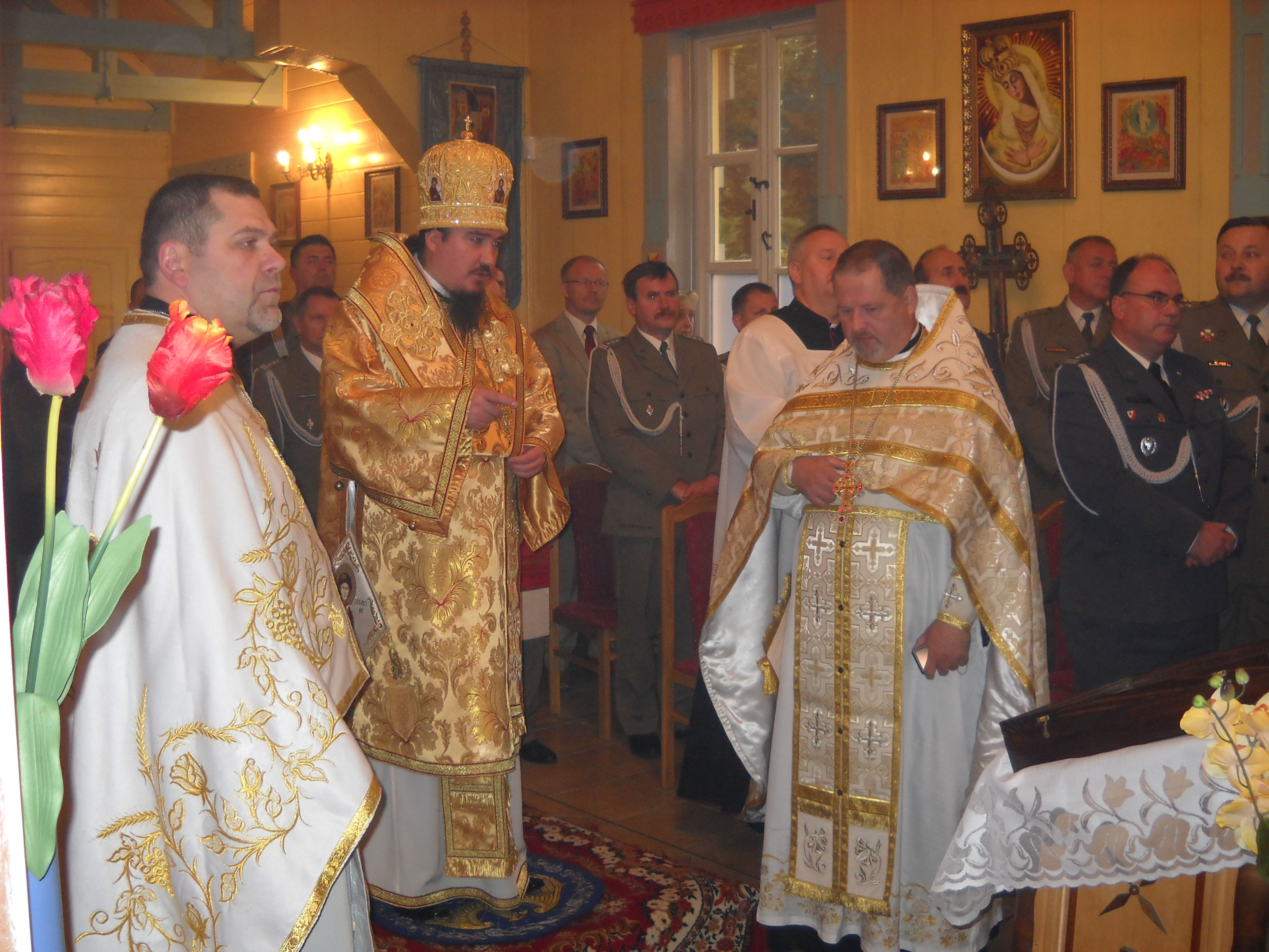 Prawosławna Święta Liturgia z okazji święta Inspektoratu Wsparcia Sił Zbrojnych w cerkwi wojskowej św. Michała Archanioła w Ciechocinku, odprawia Prawosławny Ordynariusz Wojska Polskiego bp Jerzy (Pańkowski)